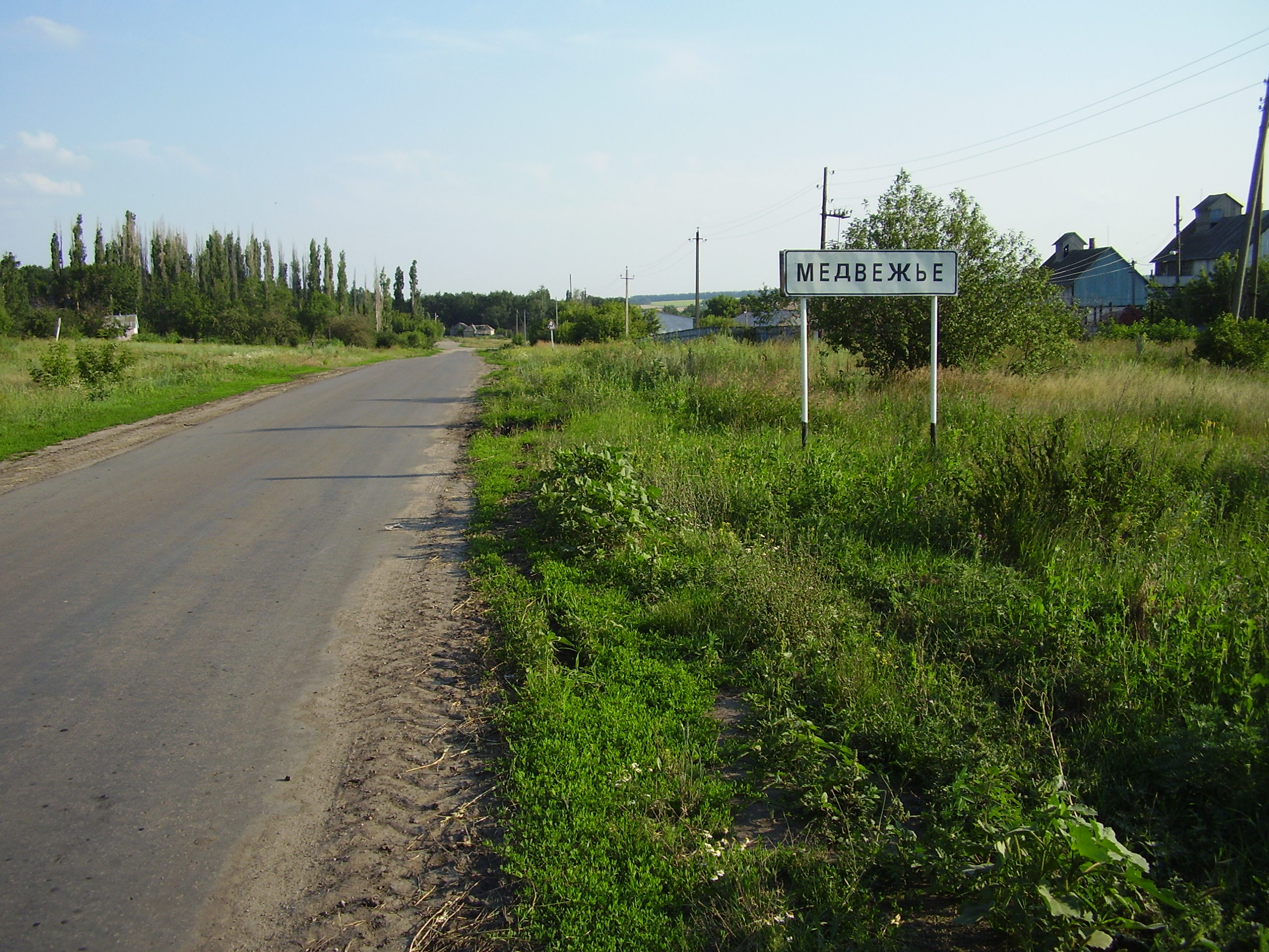 Воронежская область. Семилукский район. Въезд в с.Медвежье с северной стороны